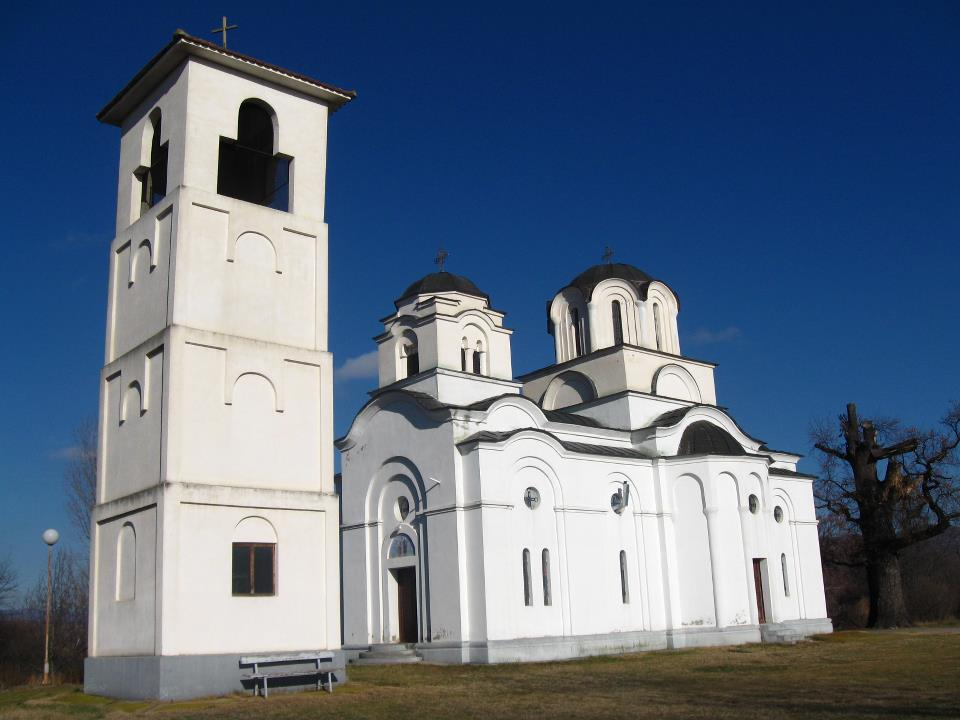 Ivica Jovanović Uslikana decembra 2011.god.